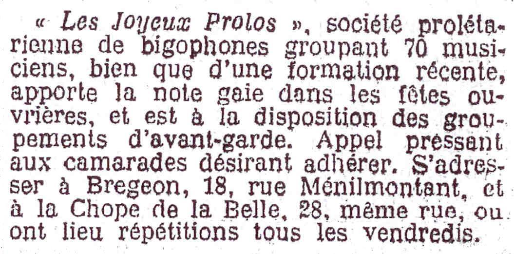 Annonce concernant une société bigophonique, page 2, 7ème colonne, rubrique "Fêtes, meetings et conférences".